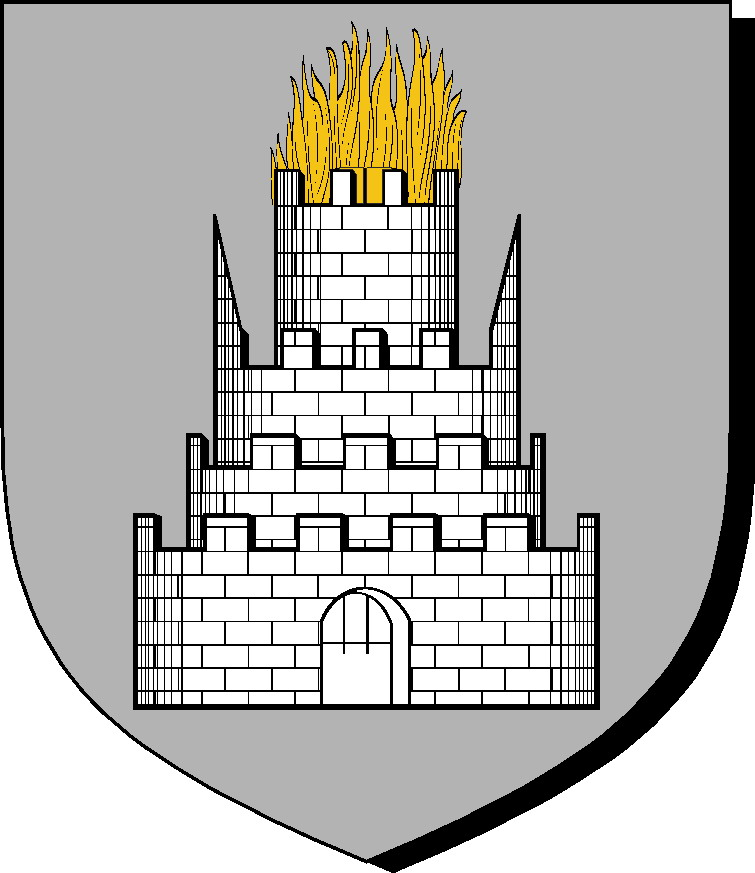 escudo libre en base a el libro cancion de hielo y fuego